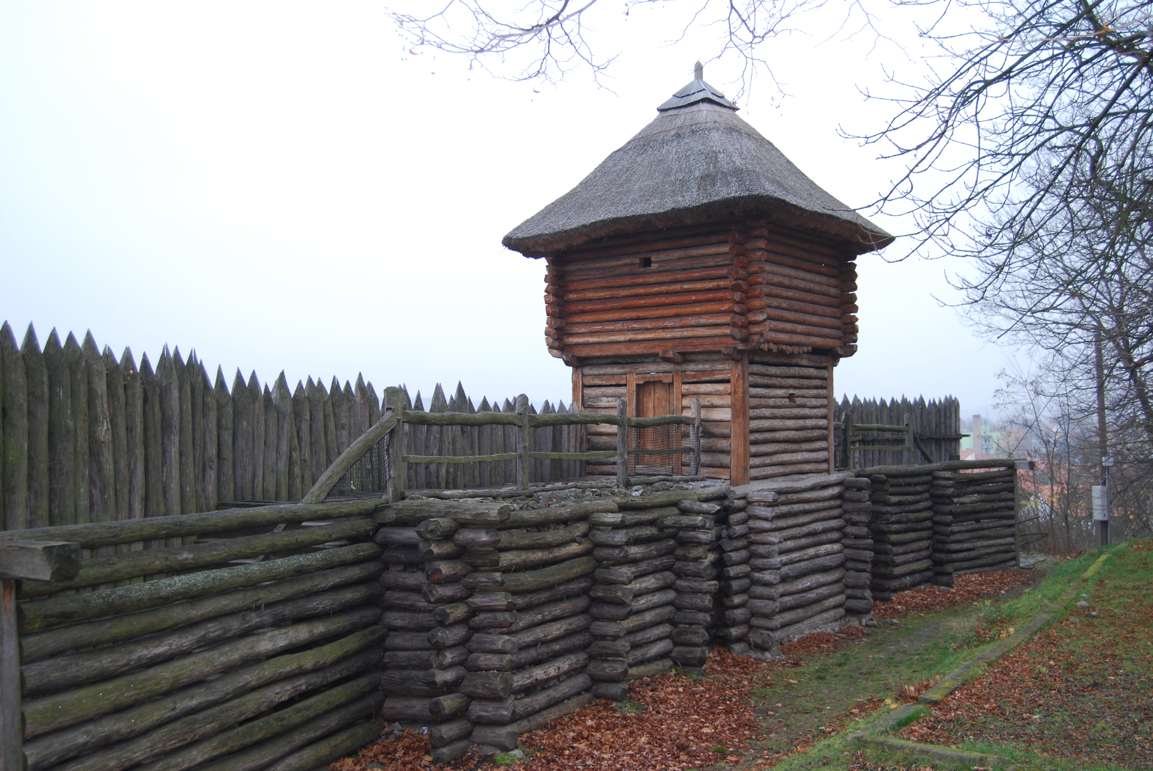 Archeopark Netolice na vrchu Svatý Ján na okraji města. Netolice. Okres Prachatice. Jihočeský kraj. Česká republika. - Google Maps - Google Earth